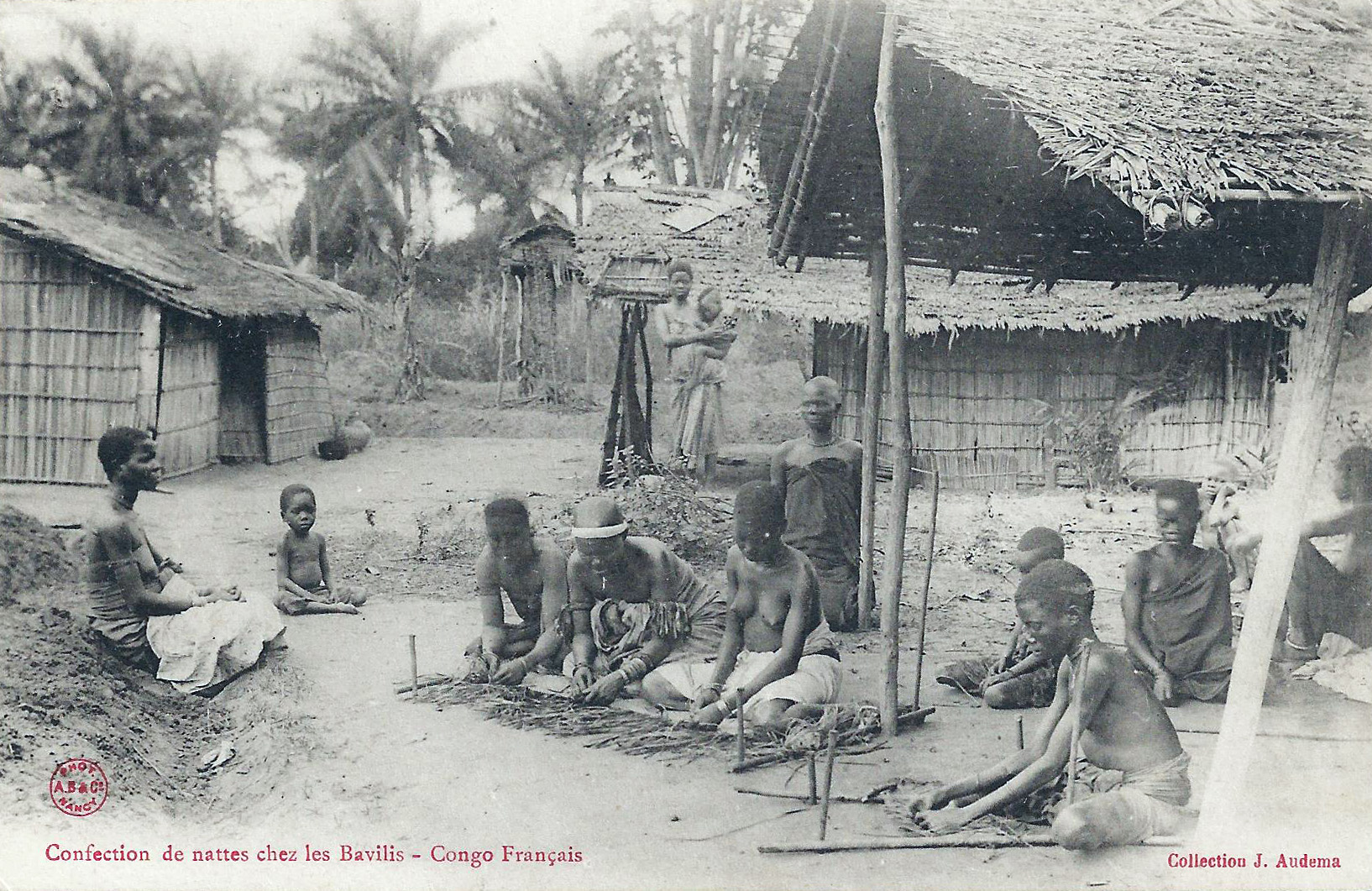 Confection de nattes chez les Bavilis. Collection J. Audema. Phot. A.B. & Cie, Nancy [Albert Bergeret] Congo Français